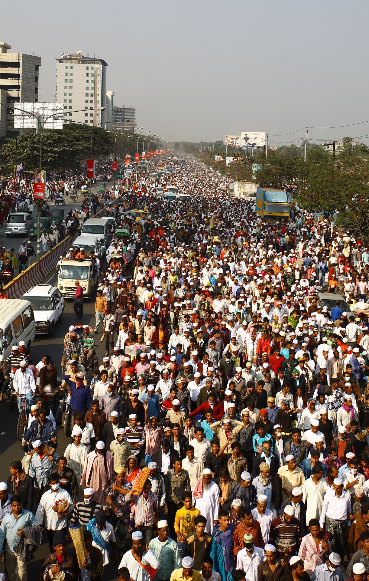 Biswa Ijtema Dhaka Bangladesh